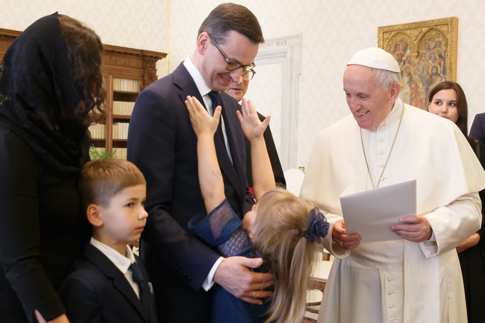 Watykan: Premier Mateusz Morawiecki złożył wizytę w Watykanie.